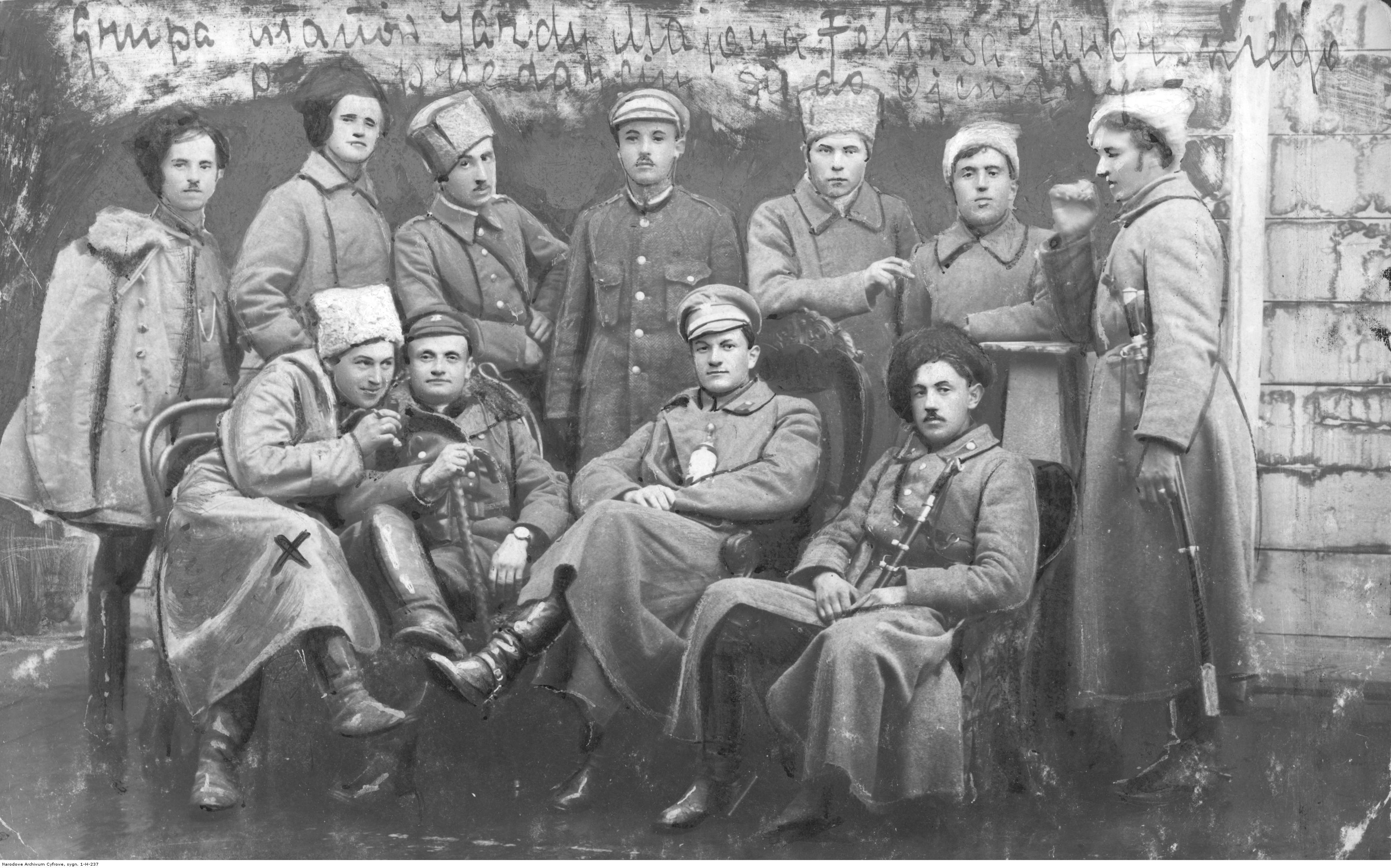 Grupa ułanów I Korpusu Polskiego w Rosji majora Feliksa Jaworskiego. Koncern Ilustrowany Kurier Codzienny - Archiwum Ilustracji. Sygnatura: 1-H-237